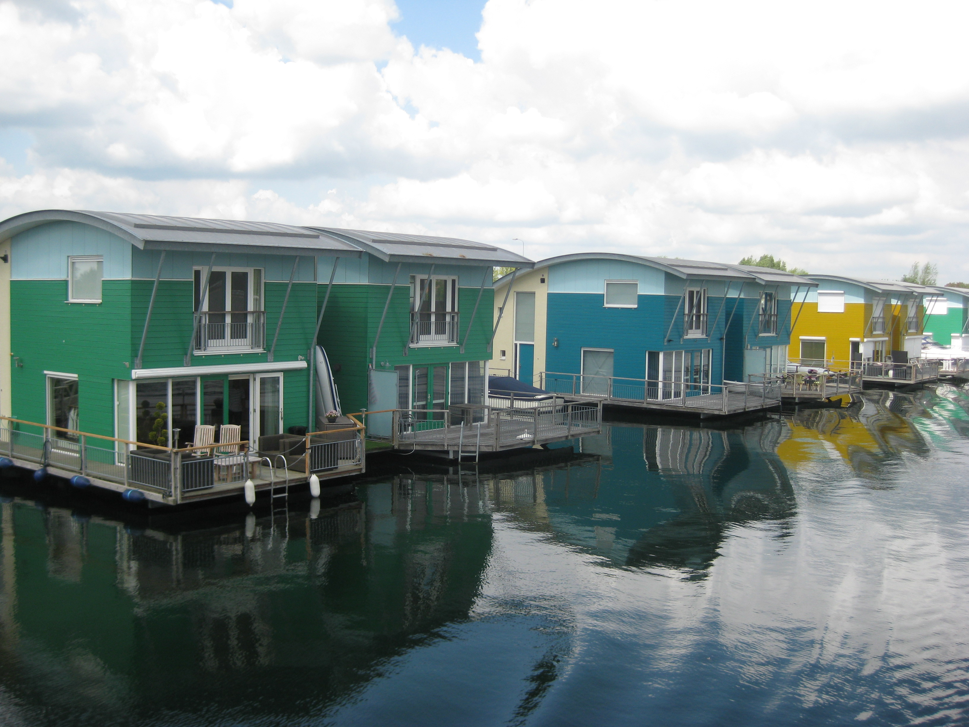 Drijvende woningen in Maasbommel